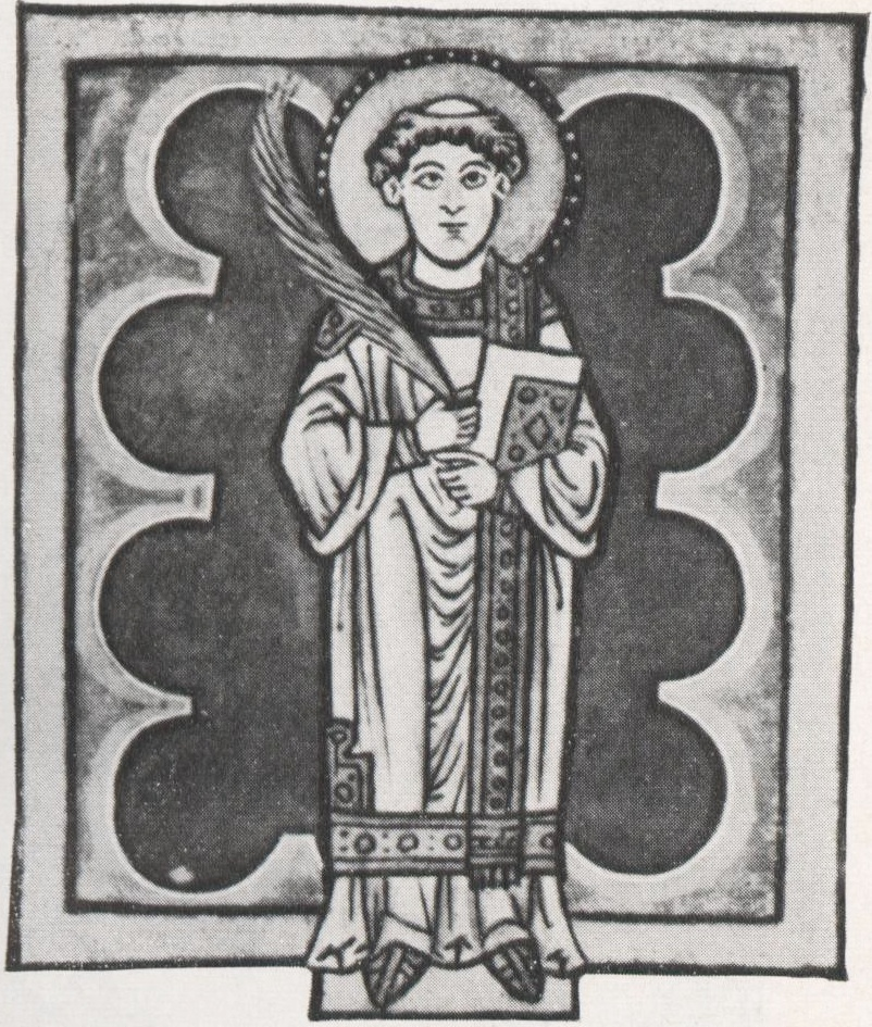 St. Cyriakus im Speyerer Evangelistar aus dem Cyriakusstift Worms, 1197. Cyriacus (griech. Kyriakos, auch Cyriak, Cyriakus; † um 303 in Rom durch Enthauptung) war ein Märtyrer aus der Zeit der Christenverfolgung in Rom, der in der katholischen und der orthodoxen Kirche als Heiliger verehrt wird. Der Heilige wird zu den Nothelfern gezählt. U.a. Kirchennamenspatron der evangelischen Kirche Cyriakuakirche in Frankfurt-Rödelheim.